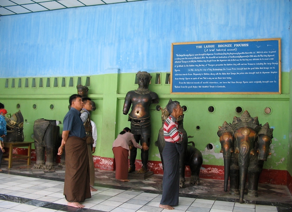 @ Maha Muni pagoda, Mandaly, Myanmar - Burma